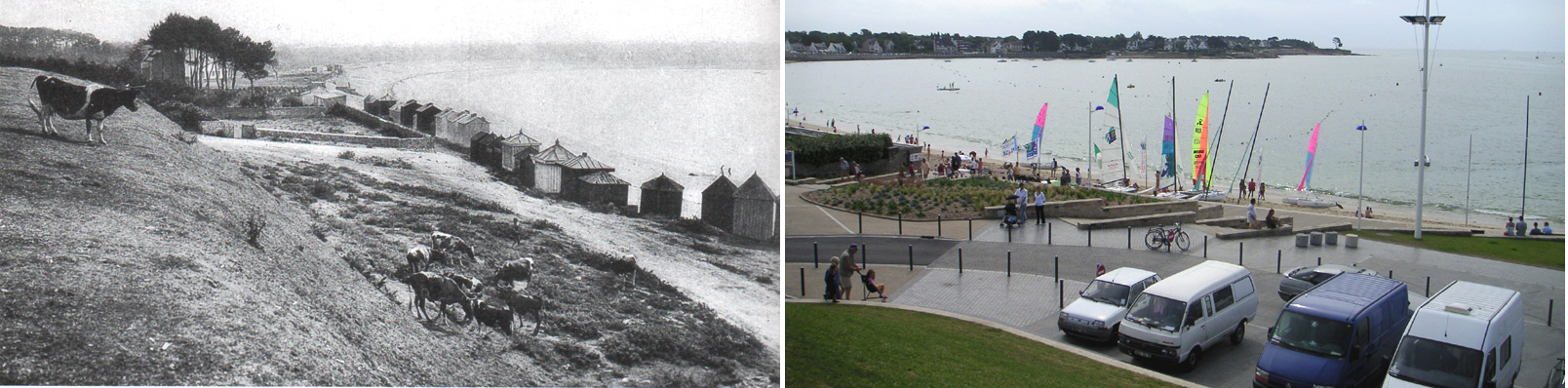 Un siècle d'écart pour ces deux vues de la grande plage prises depuis la butte du fort.